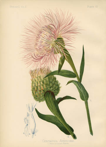 Plectocephalus americanus - como Centaurea americana